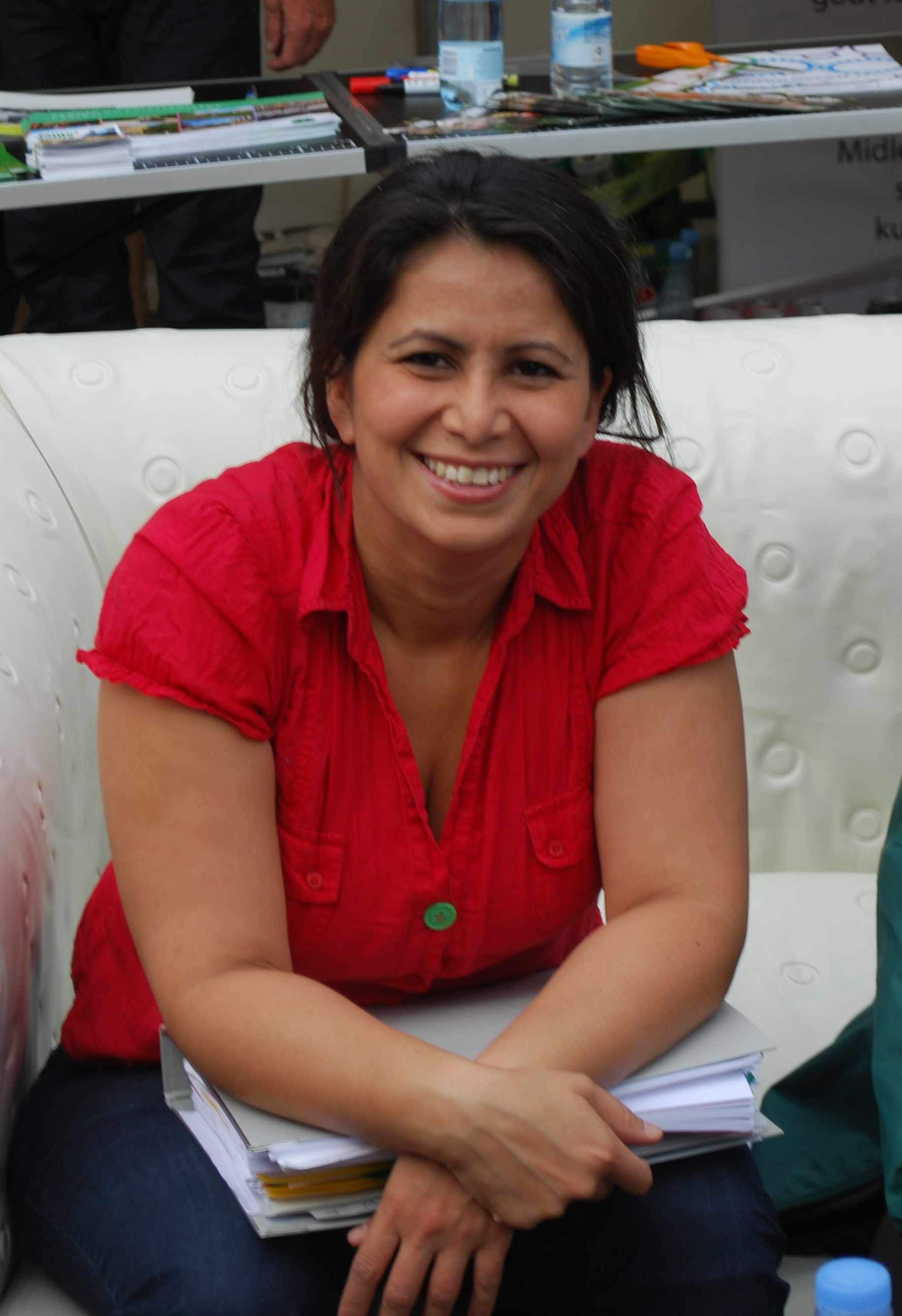 Özlem Sara Cekic ved Valby Kulturdage 2011